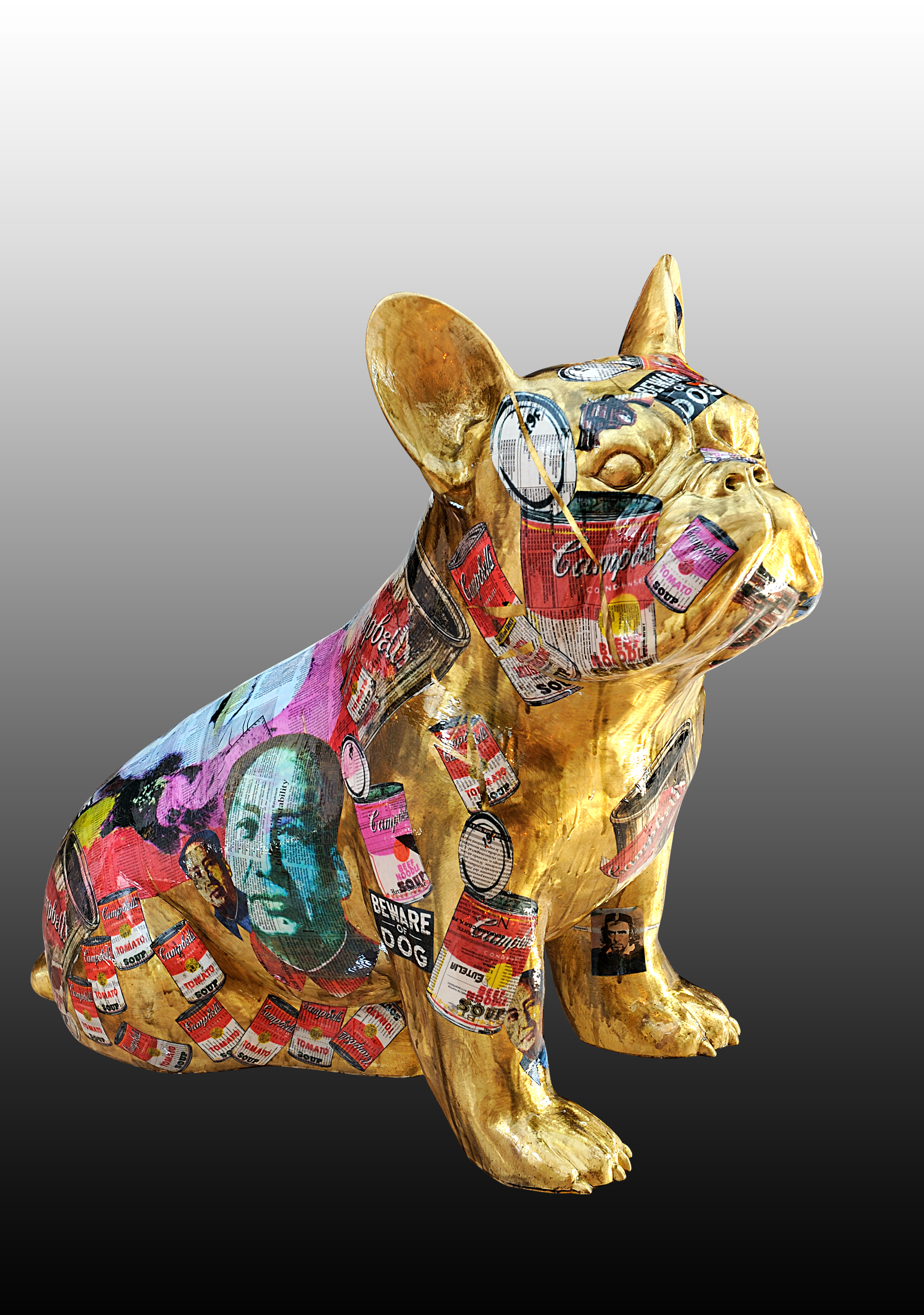 Doggy John Warhol - bronze, collage, vernis